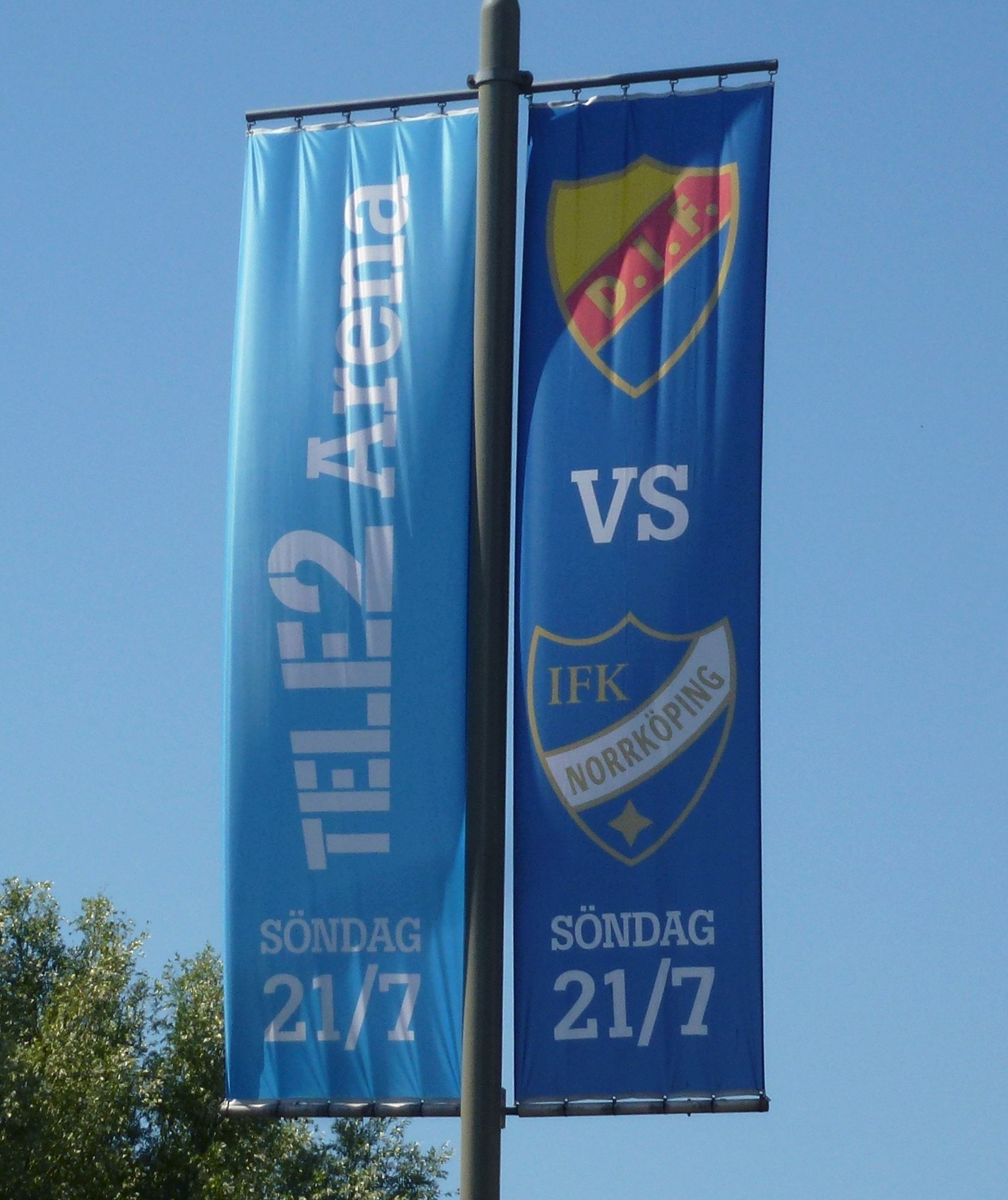 Första allsvenska matchen på Tele2 Arena: IFK Norrköping mot Djurgårdens IF, 2013-07-21